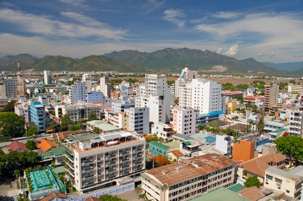 Nhatrang downtown